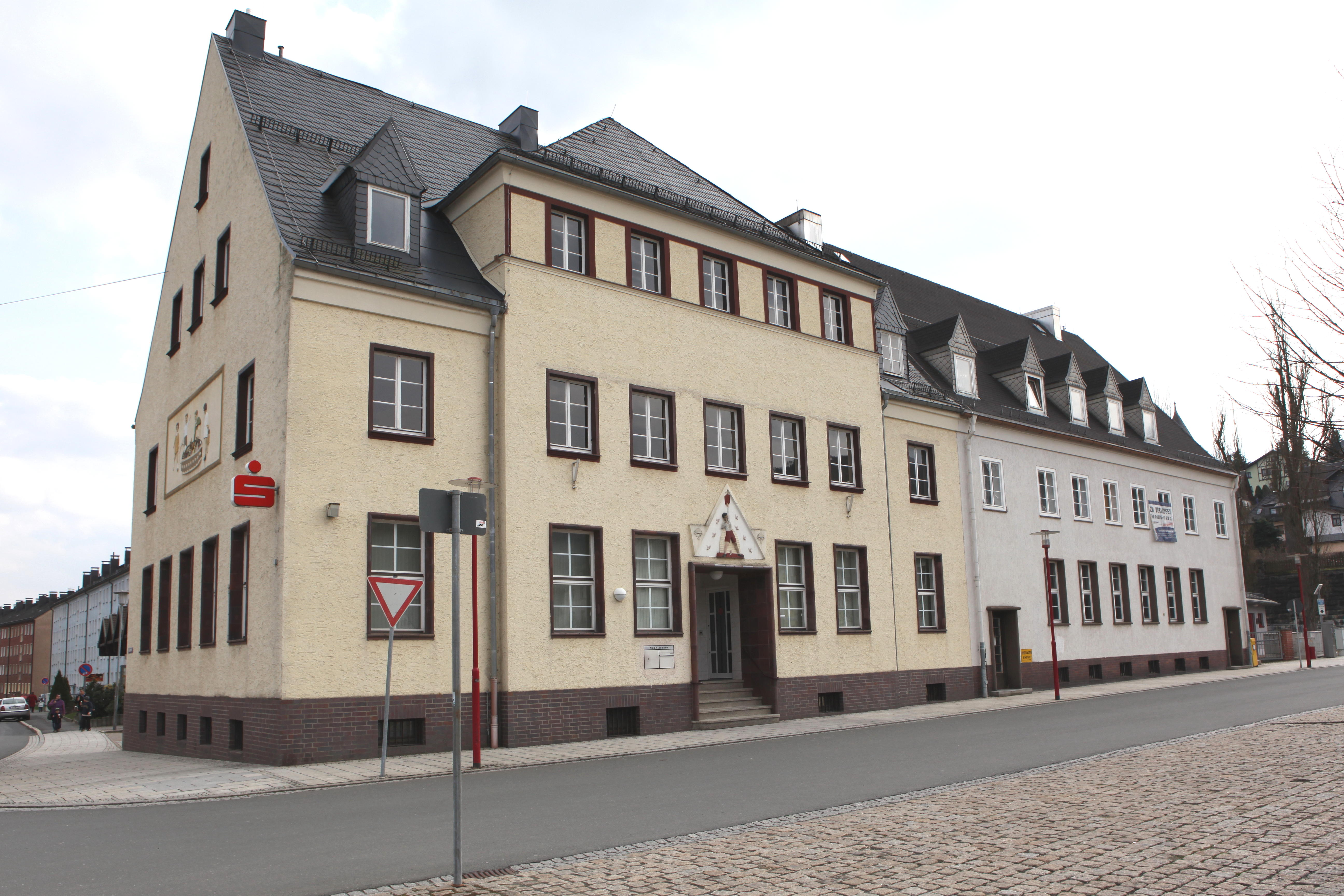 Geschäfthäuser, Marktpltz 6 und 7, Steinach in Thüringen